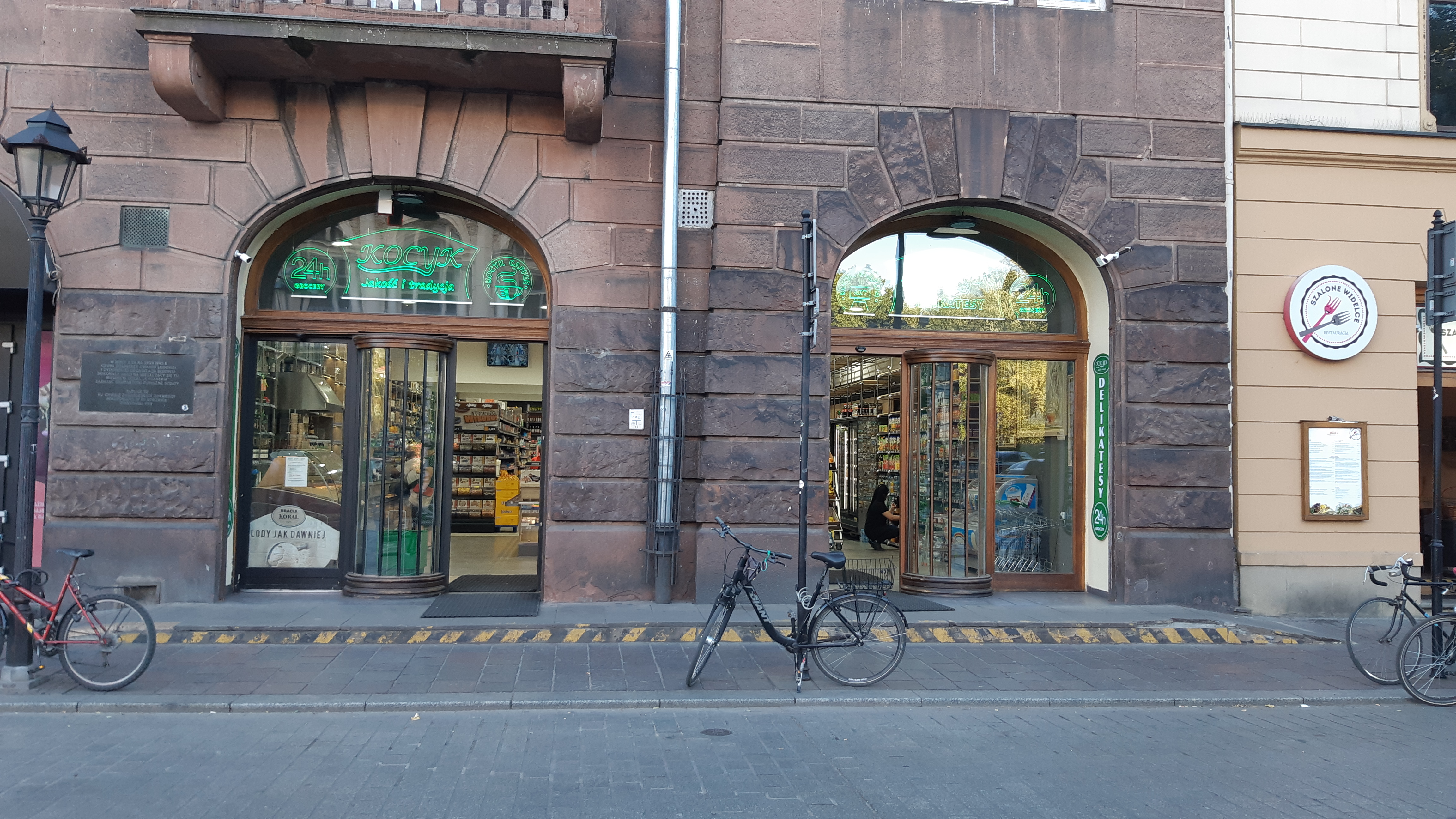 אתר "קפה ציגנריה" בקרקוב בו נערכה בדצמבר 1942 מתקפה על חיילים גרמנים - נמצא ברחוב שפיטלנה 38